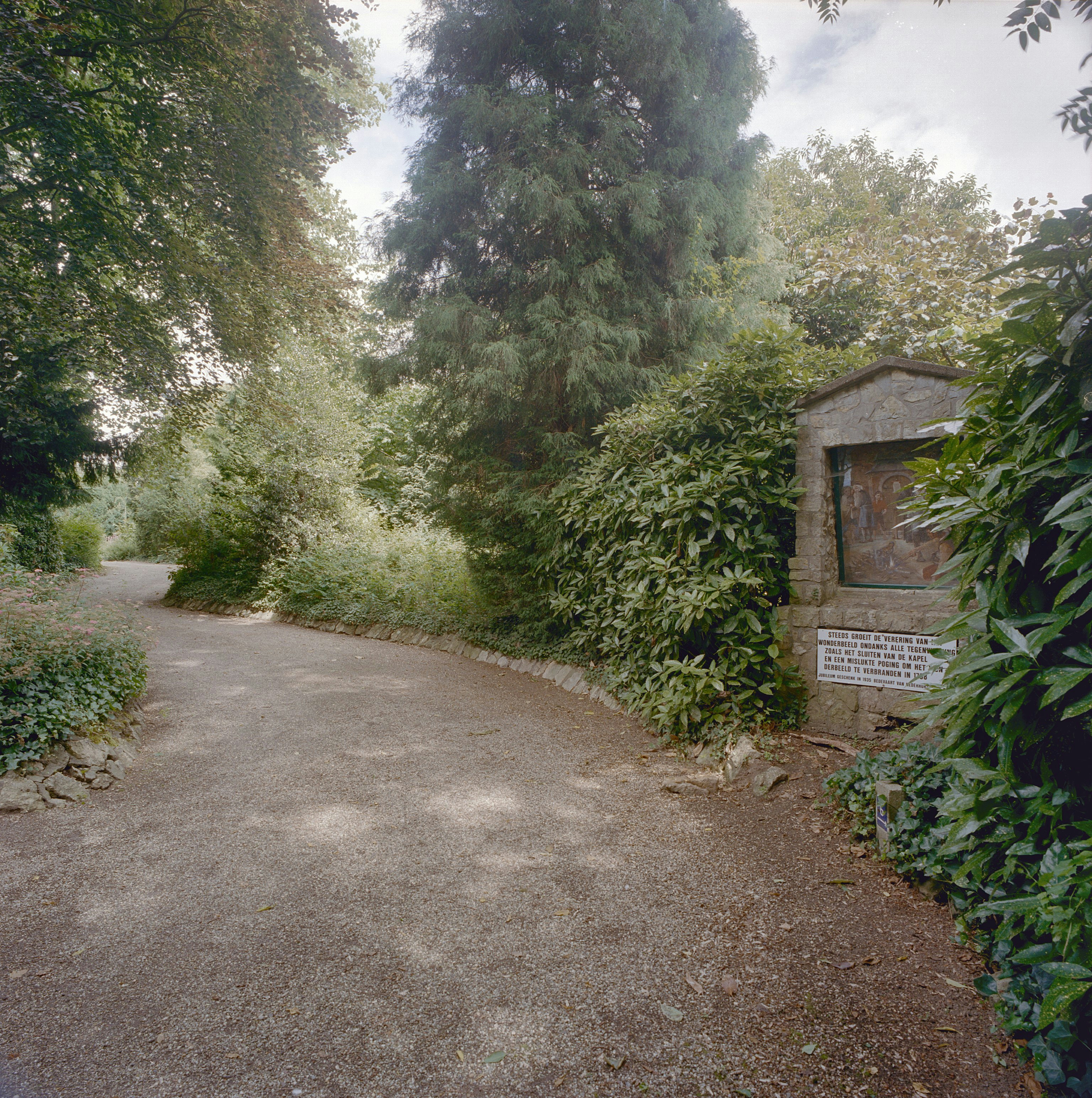 Kruiswegpark: Exterieur overzicht processiepark